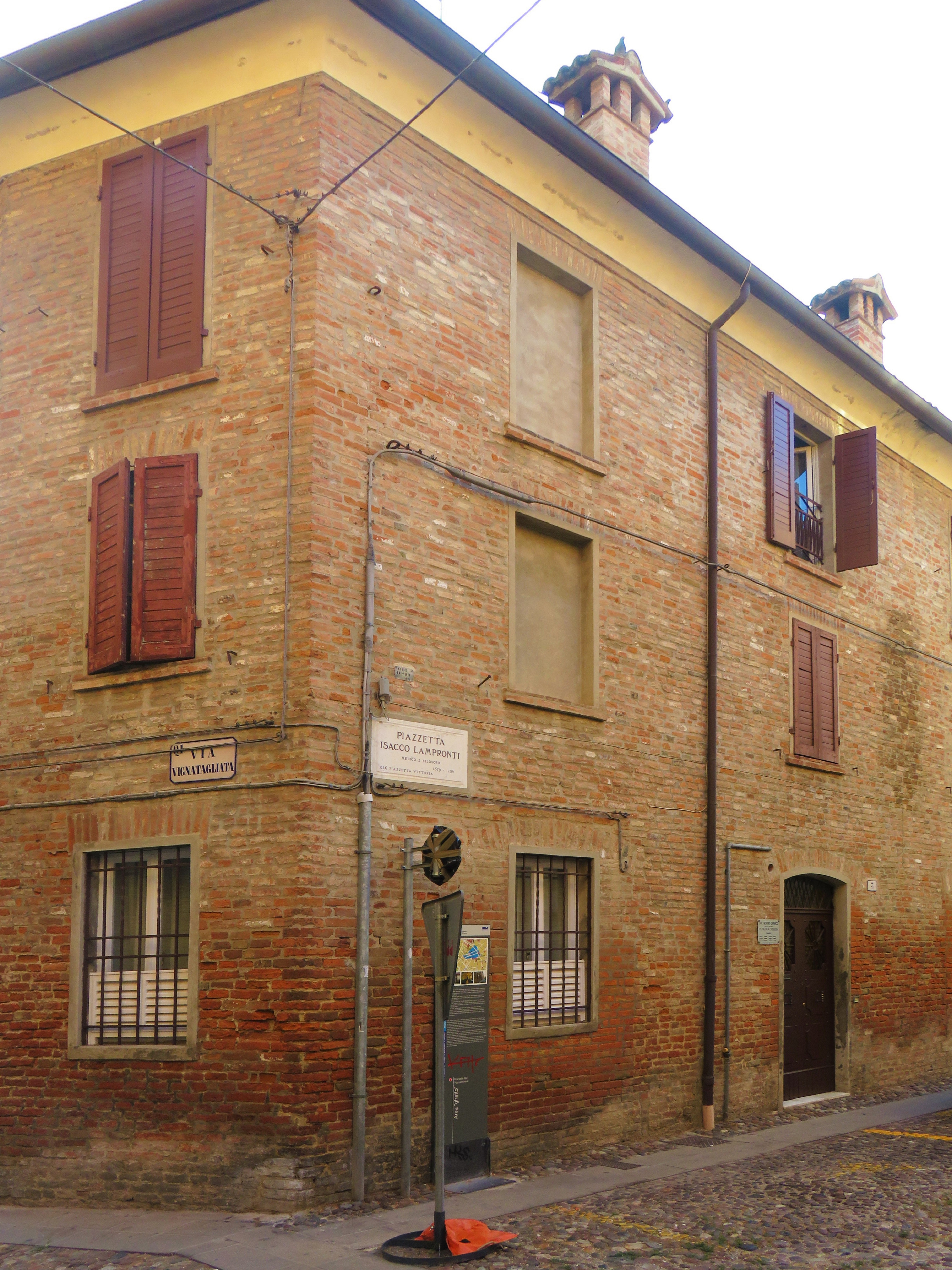 Ex ghetto ebraico di Ferrara - Piazzetta Isacco Lampronti. Angolo con via Vignatagliata.